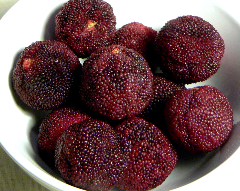 Yangmei/杨梅 Morella rubra